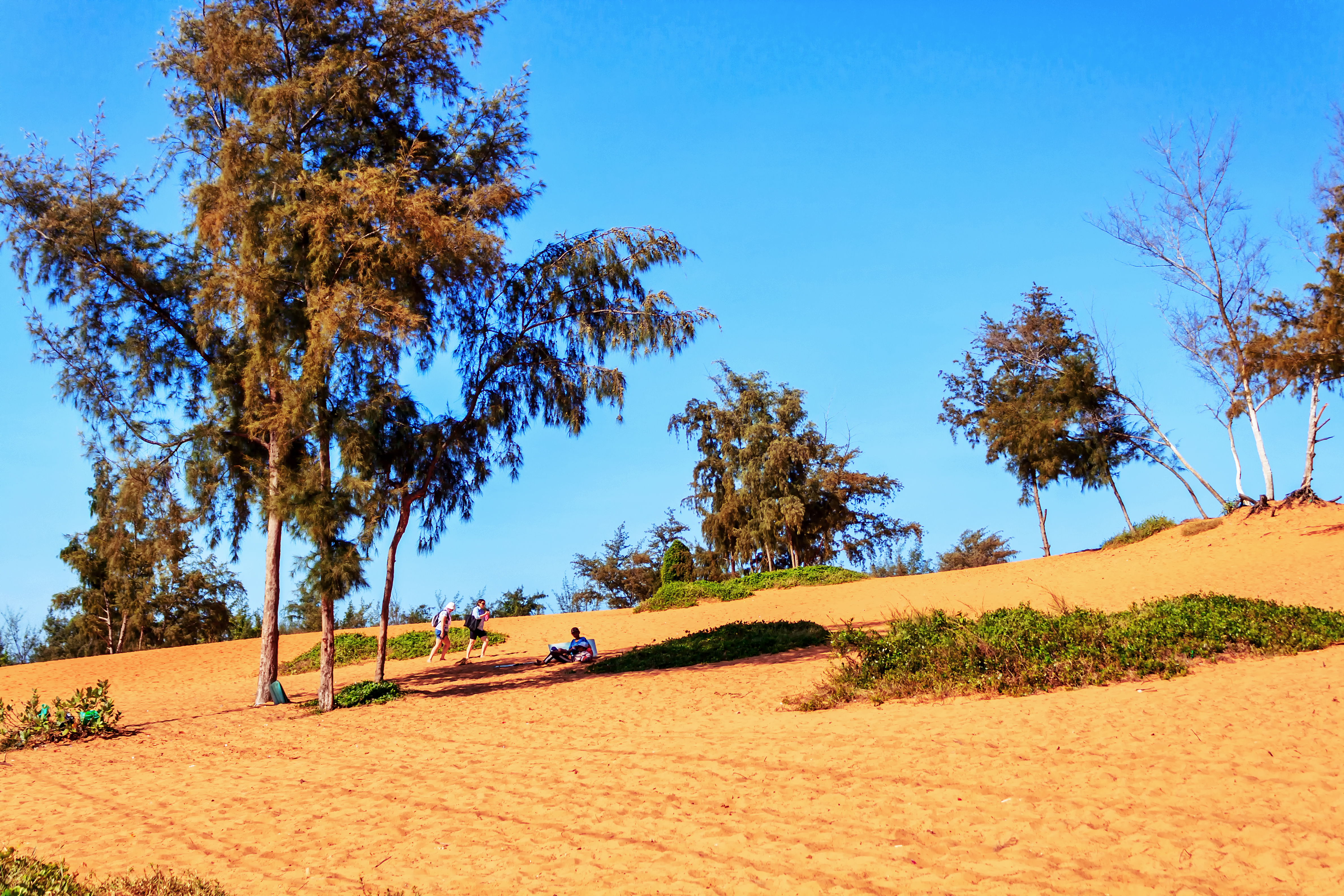 Một cảnh ở đồi cát vàng thuộc khu vực Mũi Né, Bình Thuận, Việt Nam.